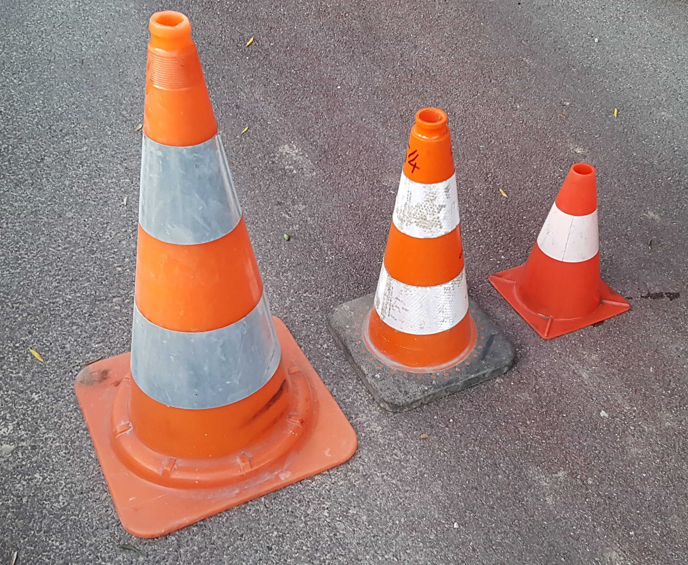 3 cones 75cm - 50cm - 30cm